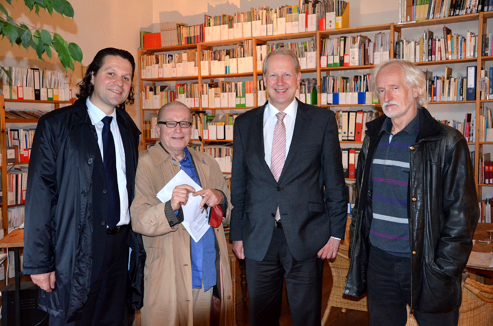 Zur Eröffnung der Feierlichkeiten zum 30jährigen Bestehen des Stadtteilzentrum Nordstadt Bürgerschule trafen sich im Wissenschaftsladen (von links) der Vorsitzende der SPD Hannover Alptekin Kirci, Walter Koch, Oberbürgermeister Stefan Schostok und Frank Puin ...